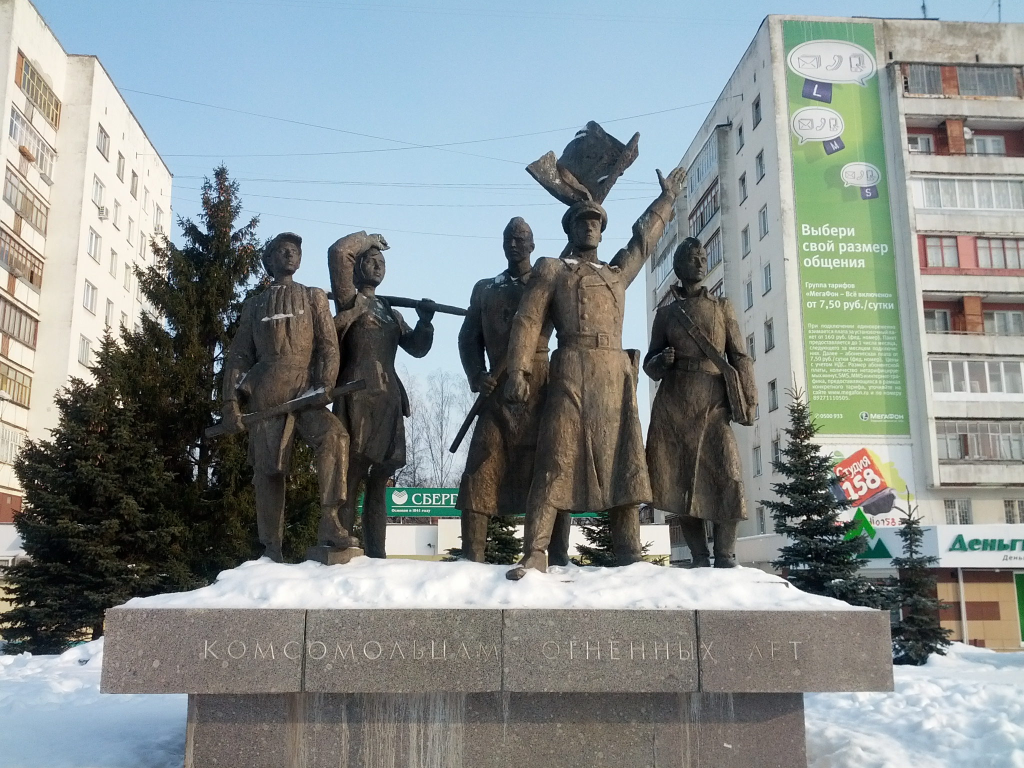 Yoshkar-Ola, Mari El Republic, Russia